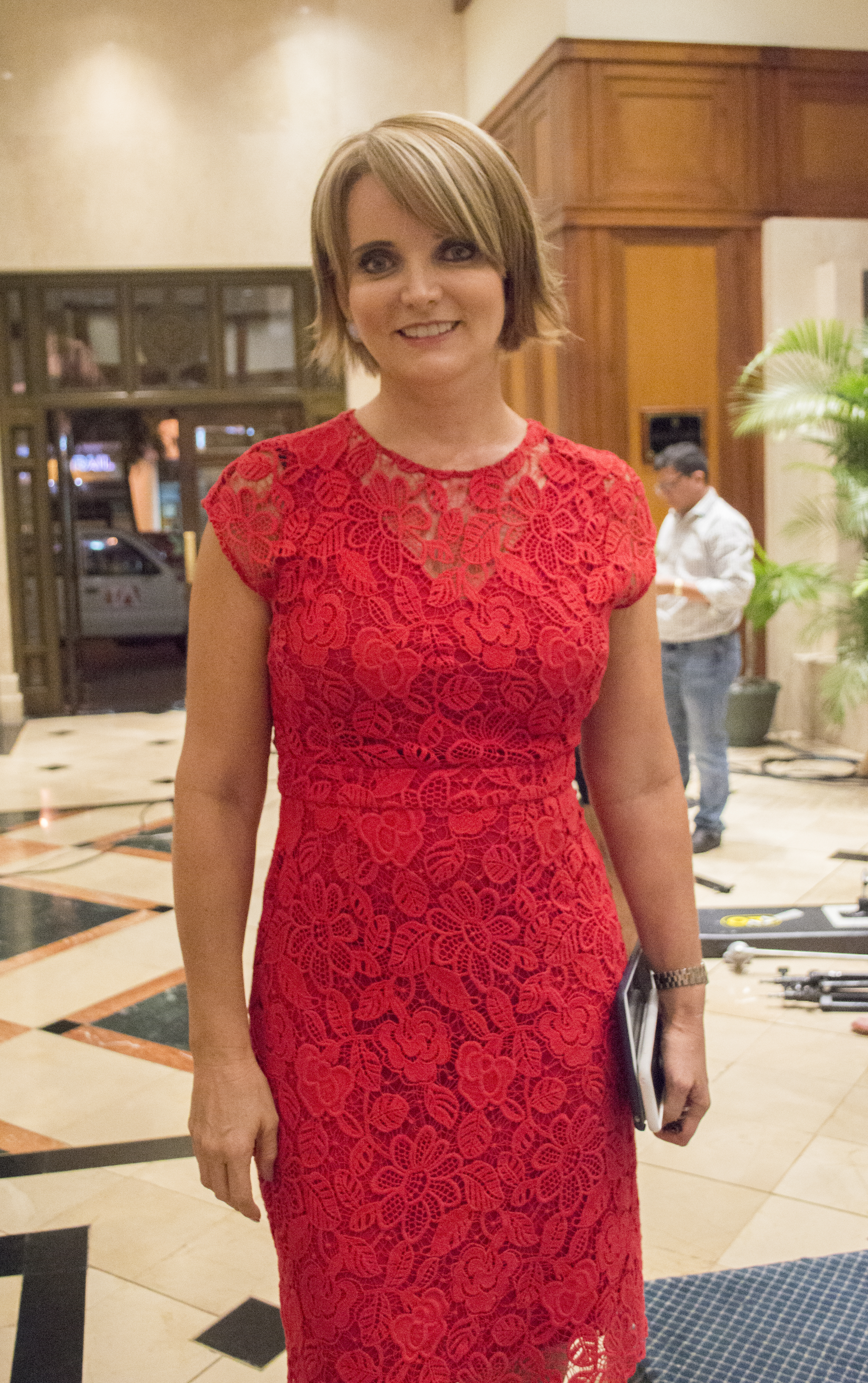 Janet Hinostroza en Guayaquil en 2016.